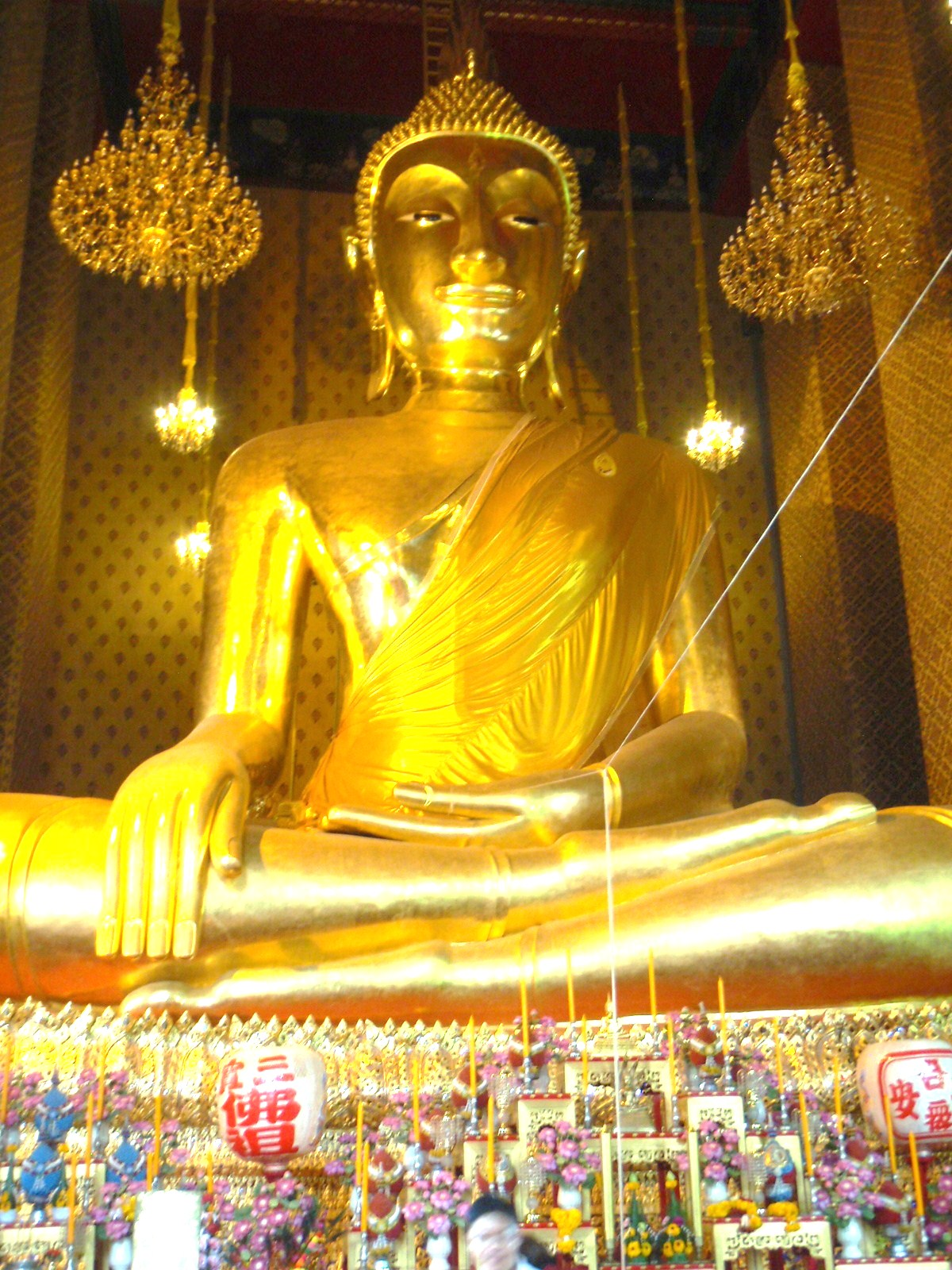 Big Buddha